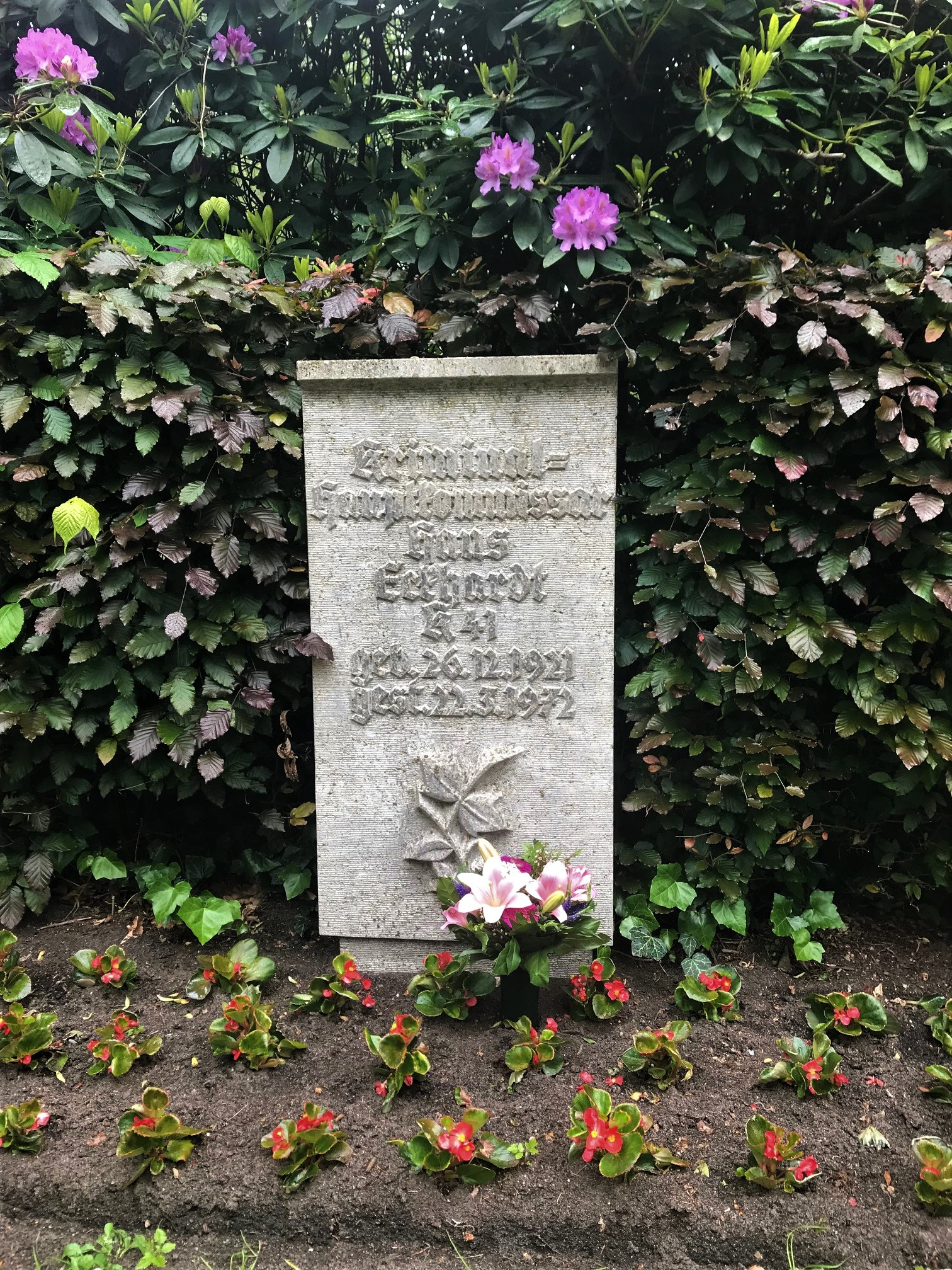 Grab von Hans Eckhardt, Ehrenfriedhof Revier Blutbuche, Hamburg Ohlsdorf